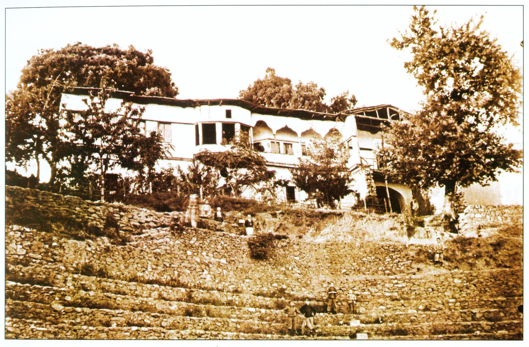 Η Μηλιώτικη Σχολή γύρω στα 1905